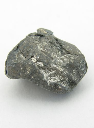 Calcium, teilweise oxidiert